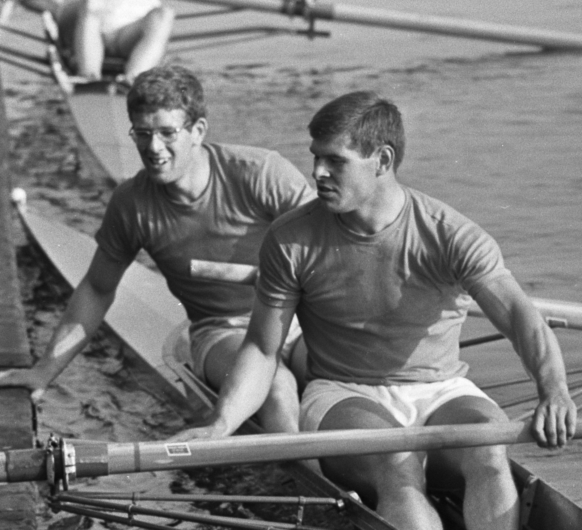 F. R. de Graaff (slag) en R. v.d. Graaf (boeg) in de twee zonder. Beiden zijn leden van de D.S.R.V. Laga. Links: Bobbie van de Graaf, rechts: Freek van de Graaf